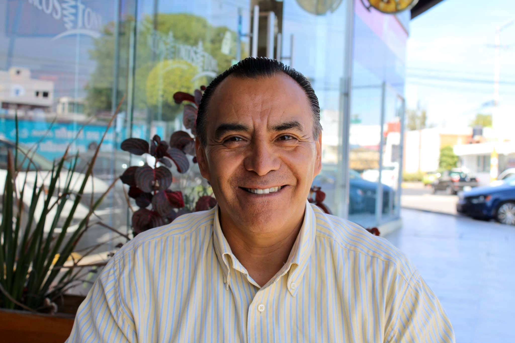 Alejandro Oaxca, ex presidente municipal de San Pedro Cholula.